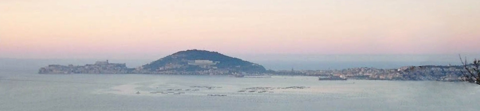 Panorama di Gaeta. Foto scattata da Formia.